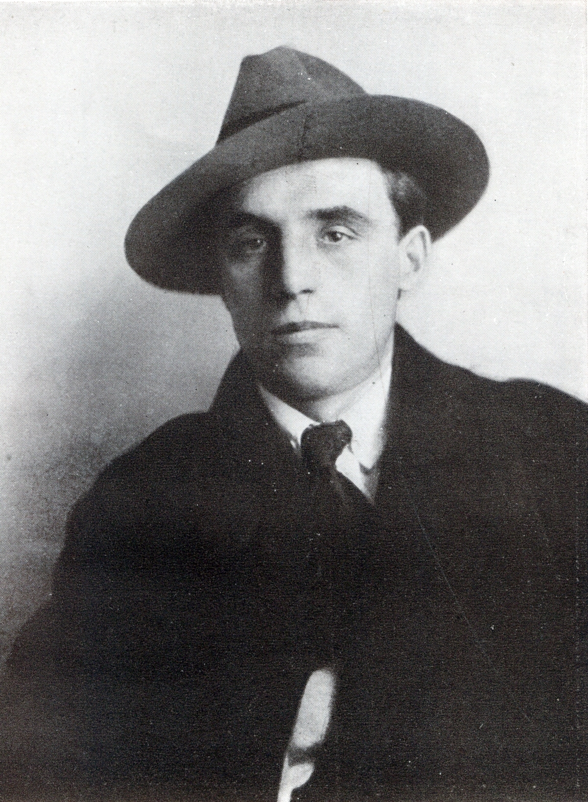 Фотографія Петра Панча